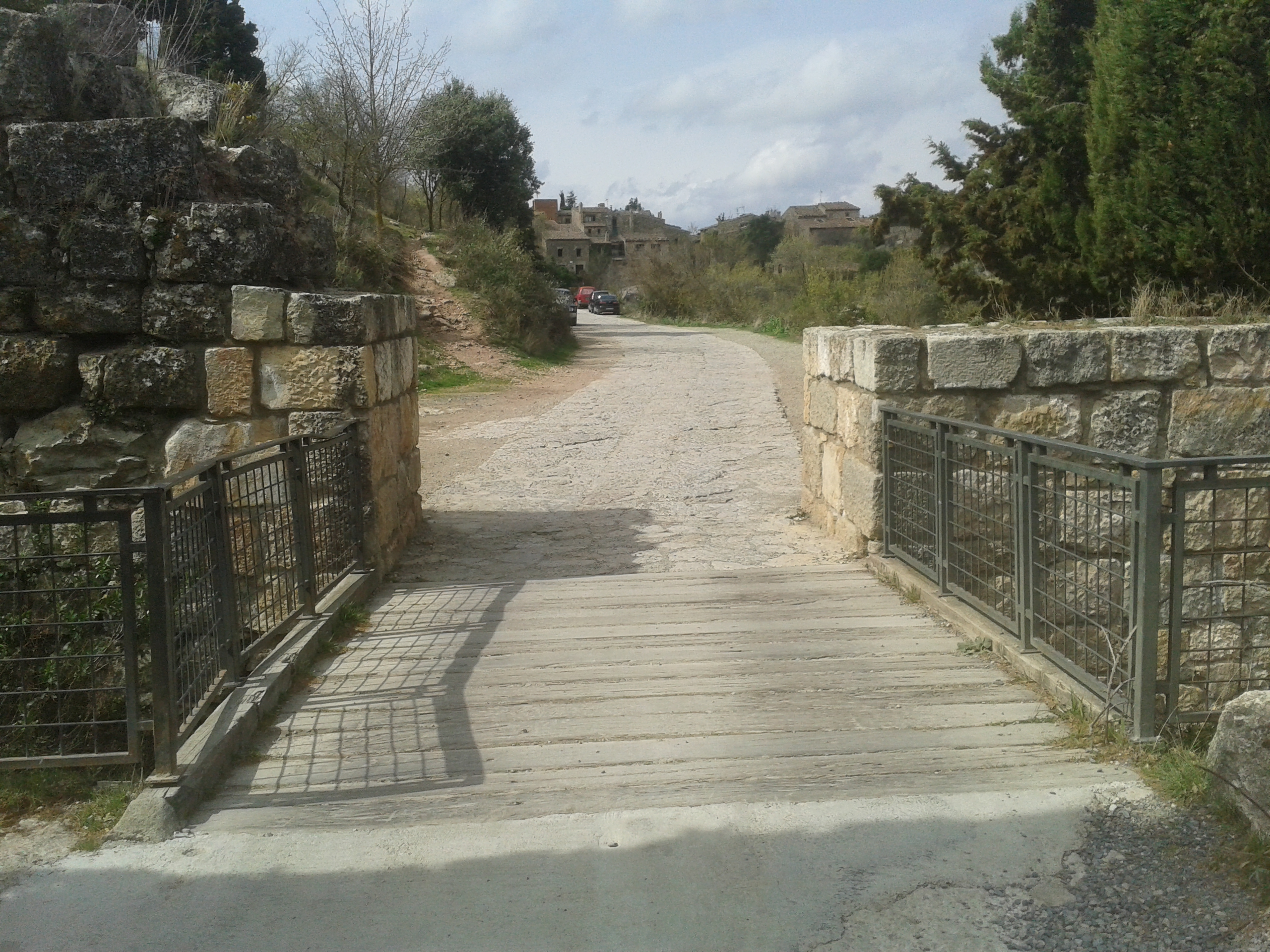 Entrada a Siurana, por el unico paso posible del istmo que era la antigua puerta con puente levadizo